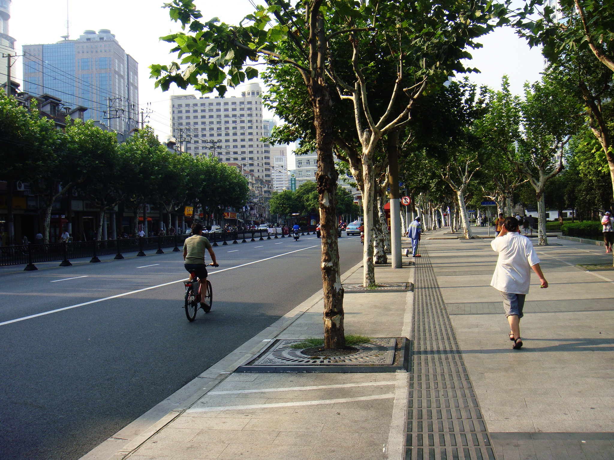 中文（中国大陆）: 老西门段的人民路